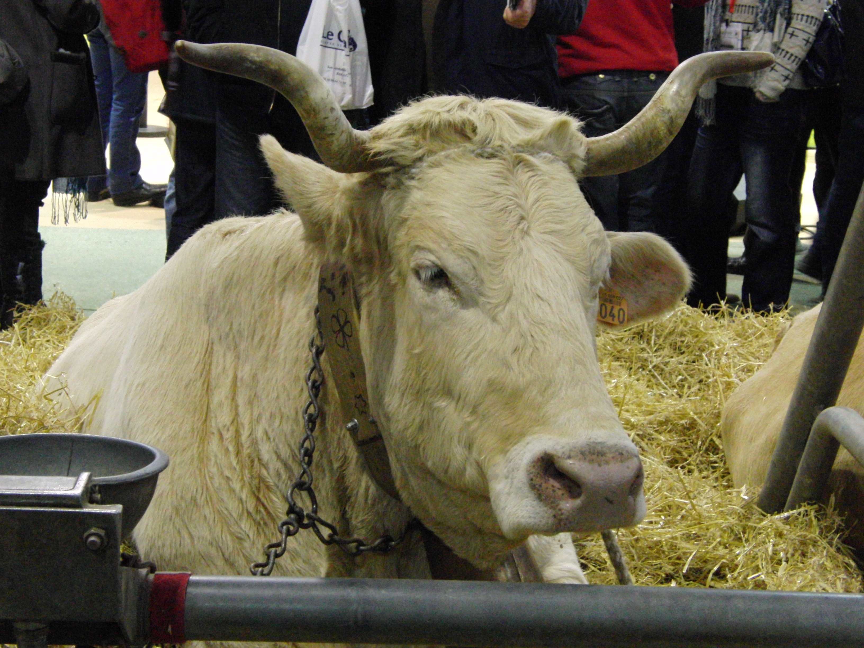 Vache Lourdaise - Salon international de l'agriculture 2013, Paris, France